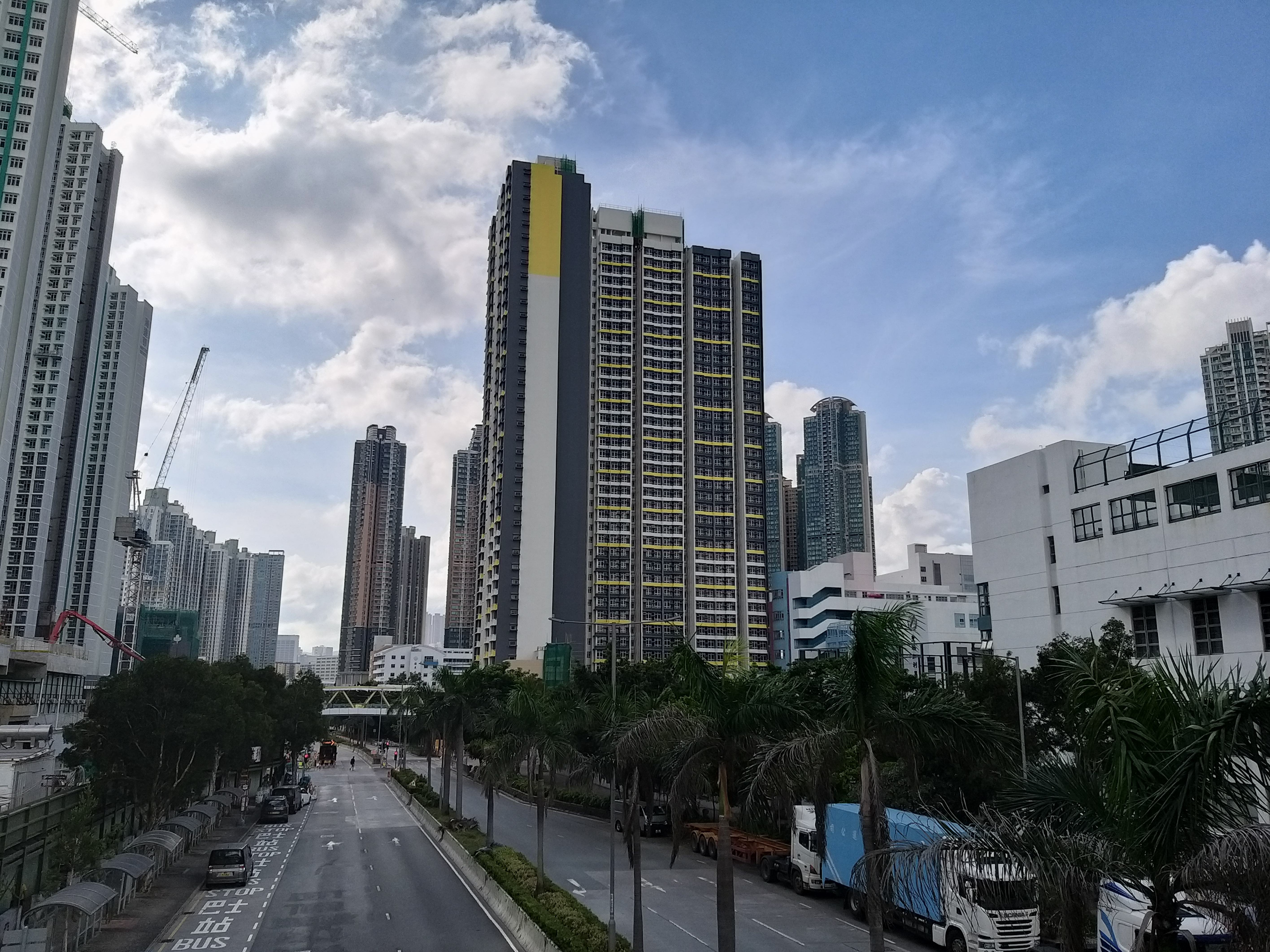 大致完工，入伙可期